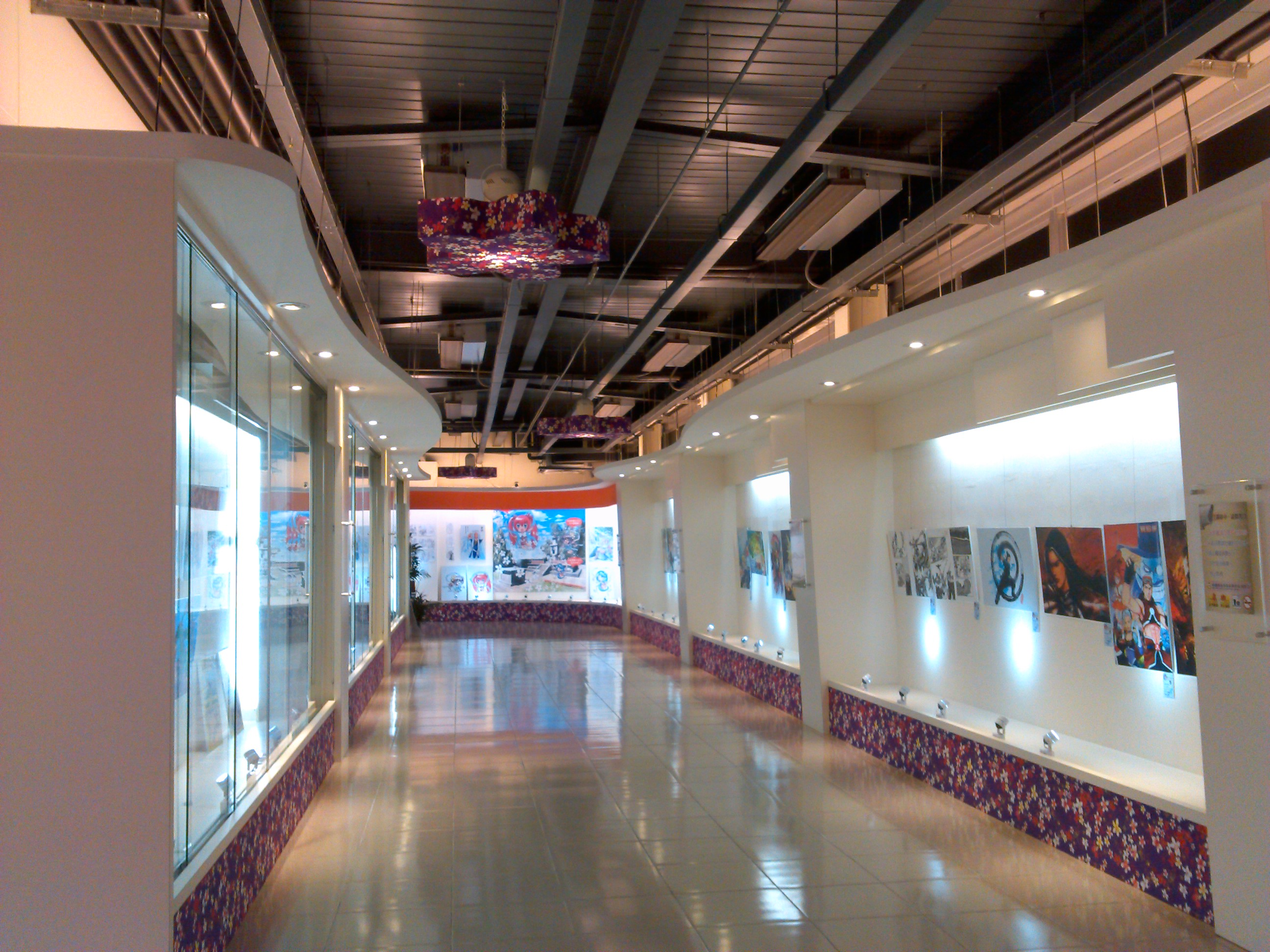 桃園縣客家文化館，A1特展室 (中華漫畫家協會授權拍攝)